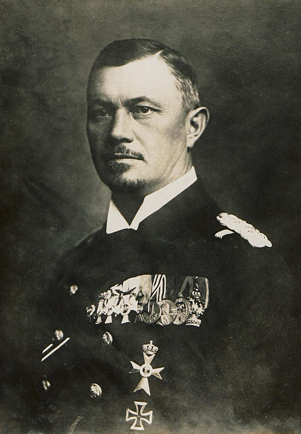 Vicealmirante Reinhard Scheer